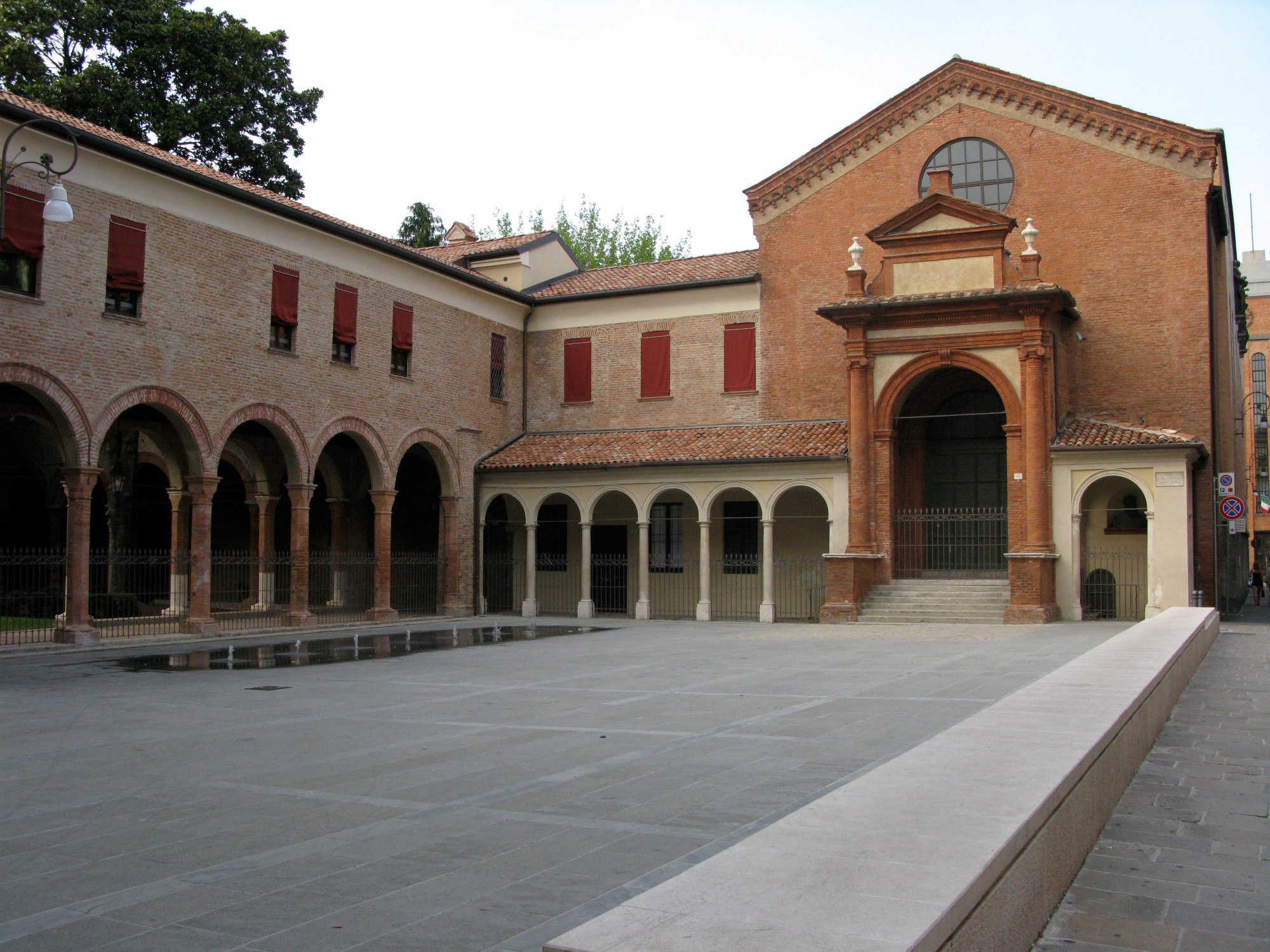 Ferrare 568